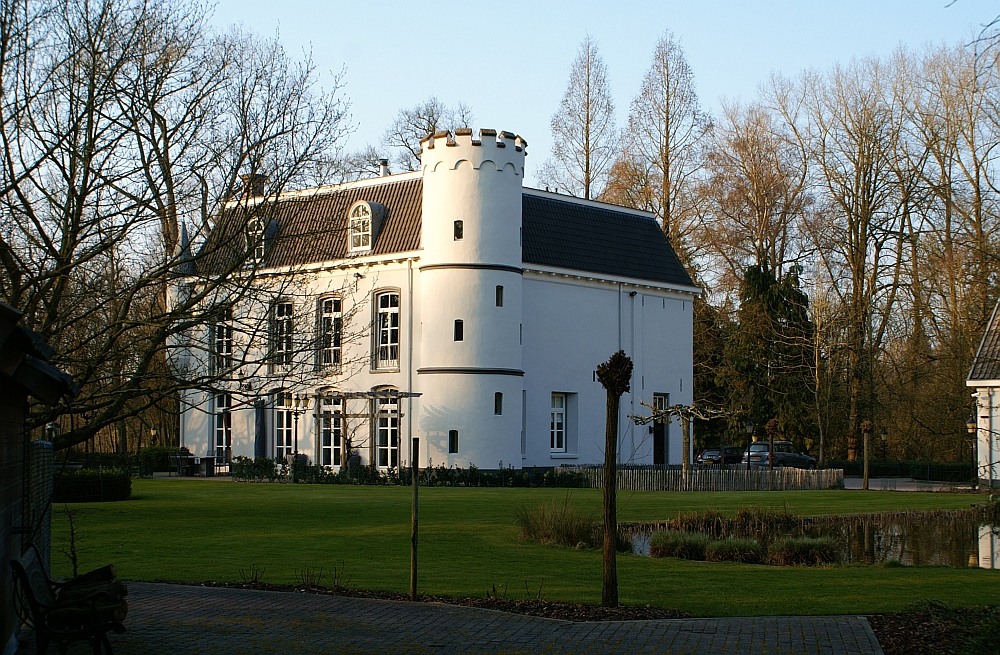 Huis Heerenbeek te Oirschot.